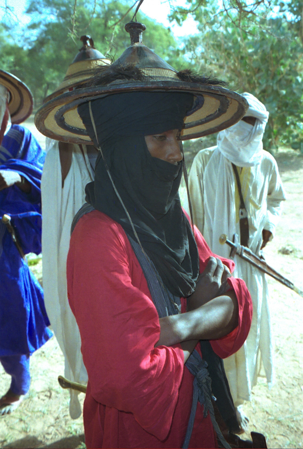 A Wodaabe man. Niger, 19971997 #275-27 Wodaabe fashion